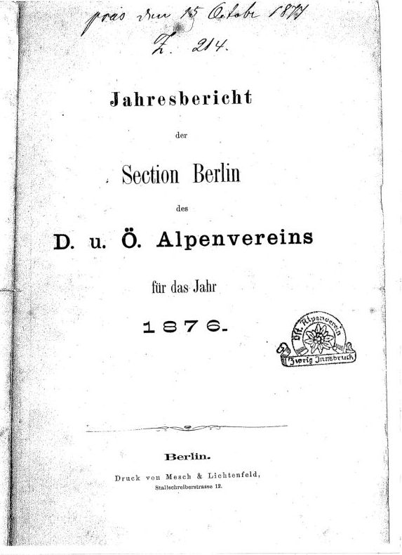 Titelblatt des Jahresberichtes der Sektion berlin des DOeAV